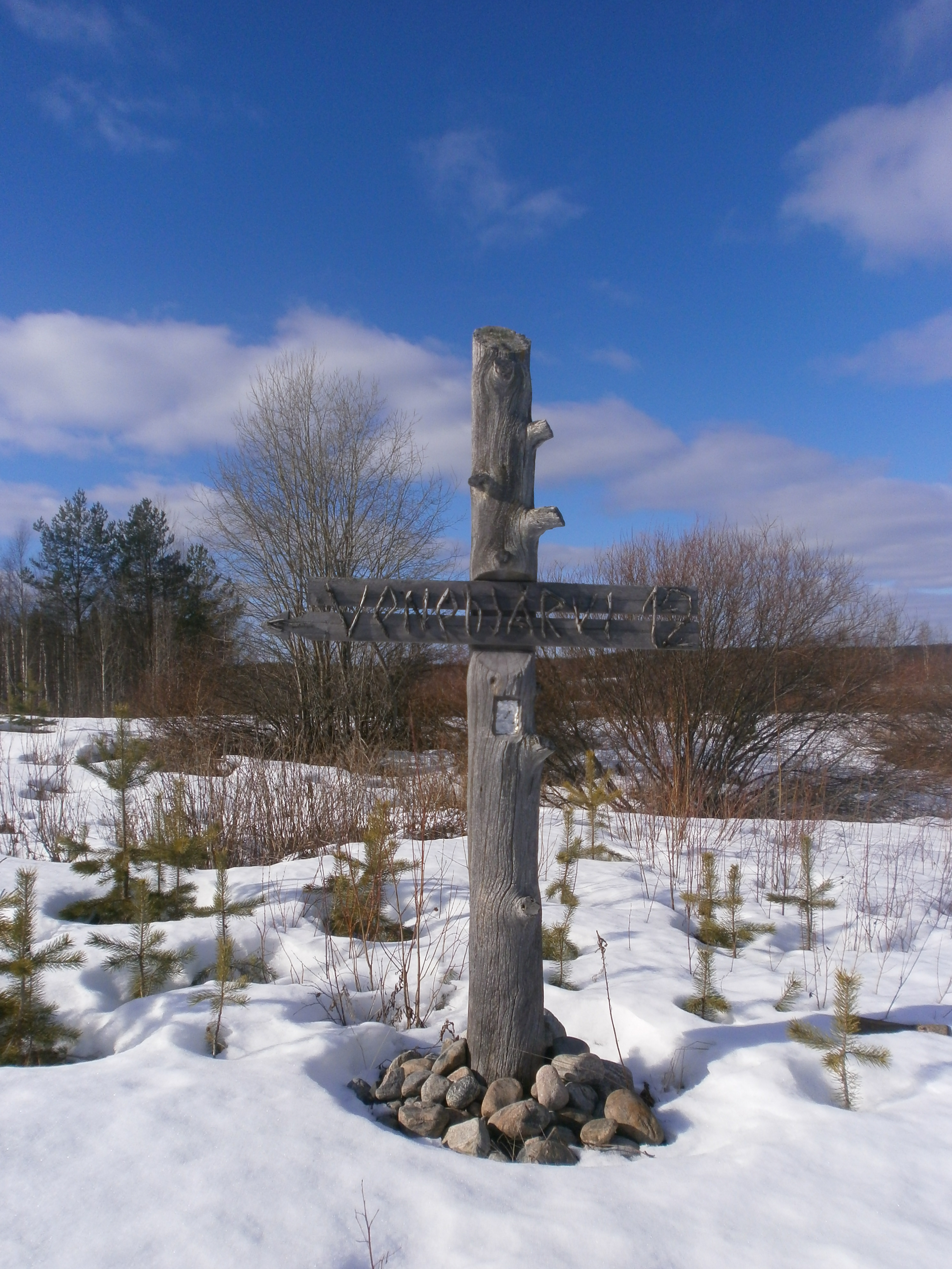 Tienviitta Venehjärvelle n. 12 km Vuokkiniemestä